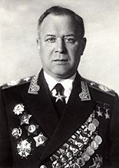 Александр Александрович Новиков (1900 — 1976) — советский военачальник, Главный маршал авиации.1960-е гг.